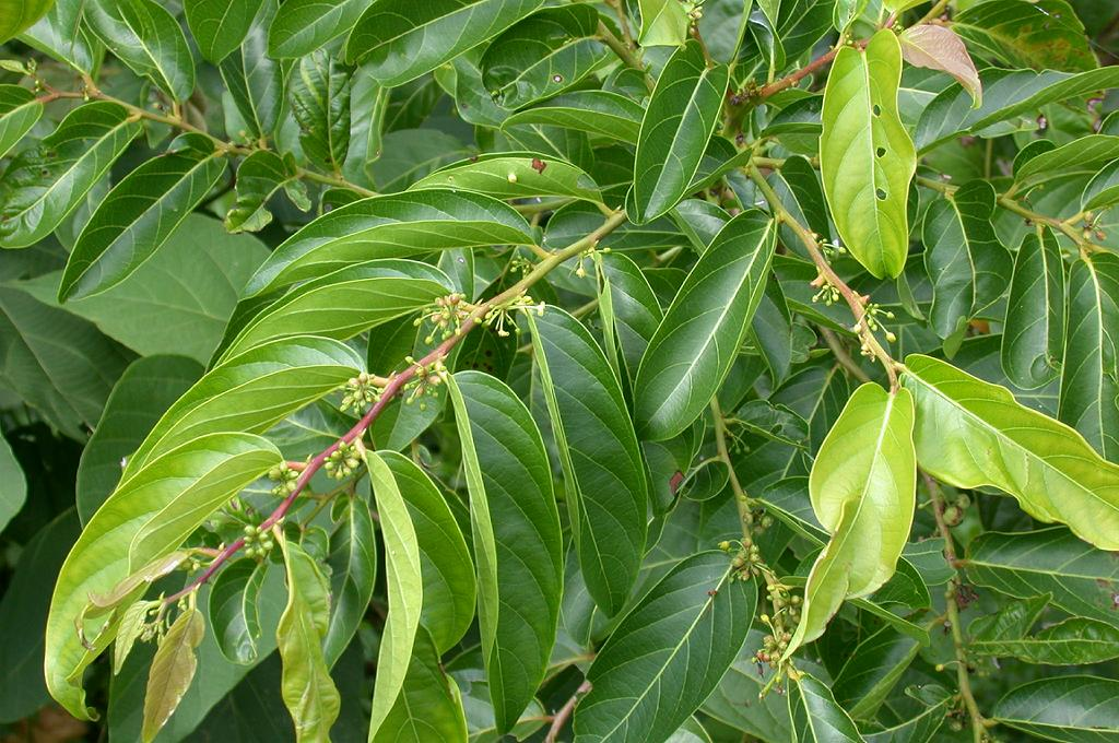 Glochidion zeylanicum：カキバカンコノキ 2002/08/18 沖縄本島恩納村：Okinawa Island, Japan